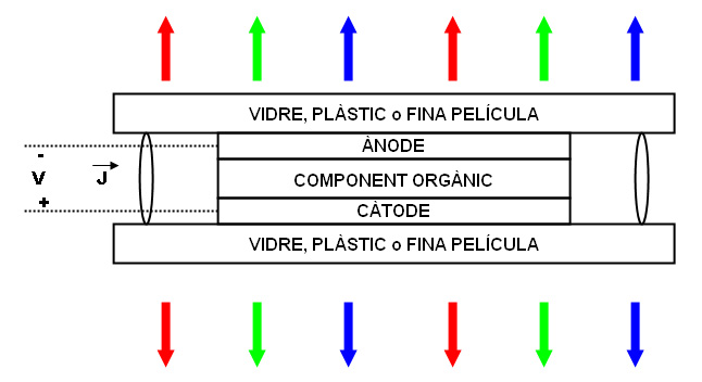 OLED structure; catalan text